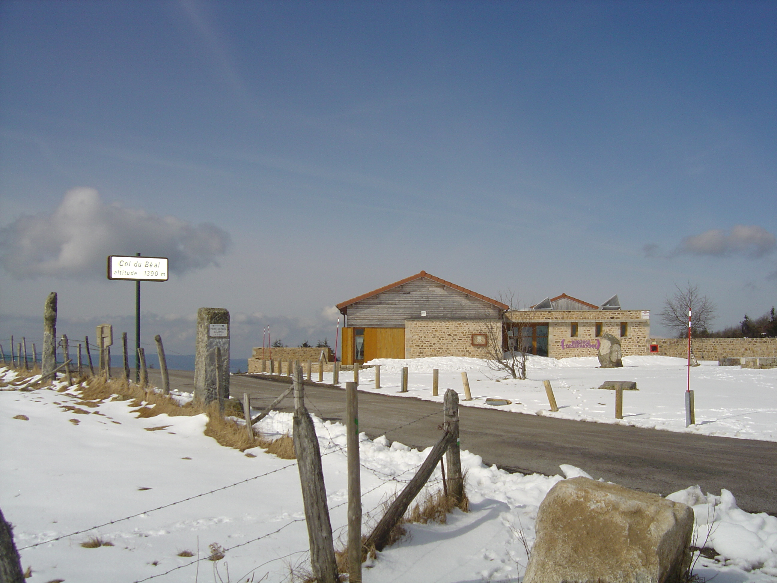 col du Béal